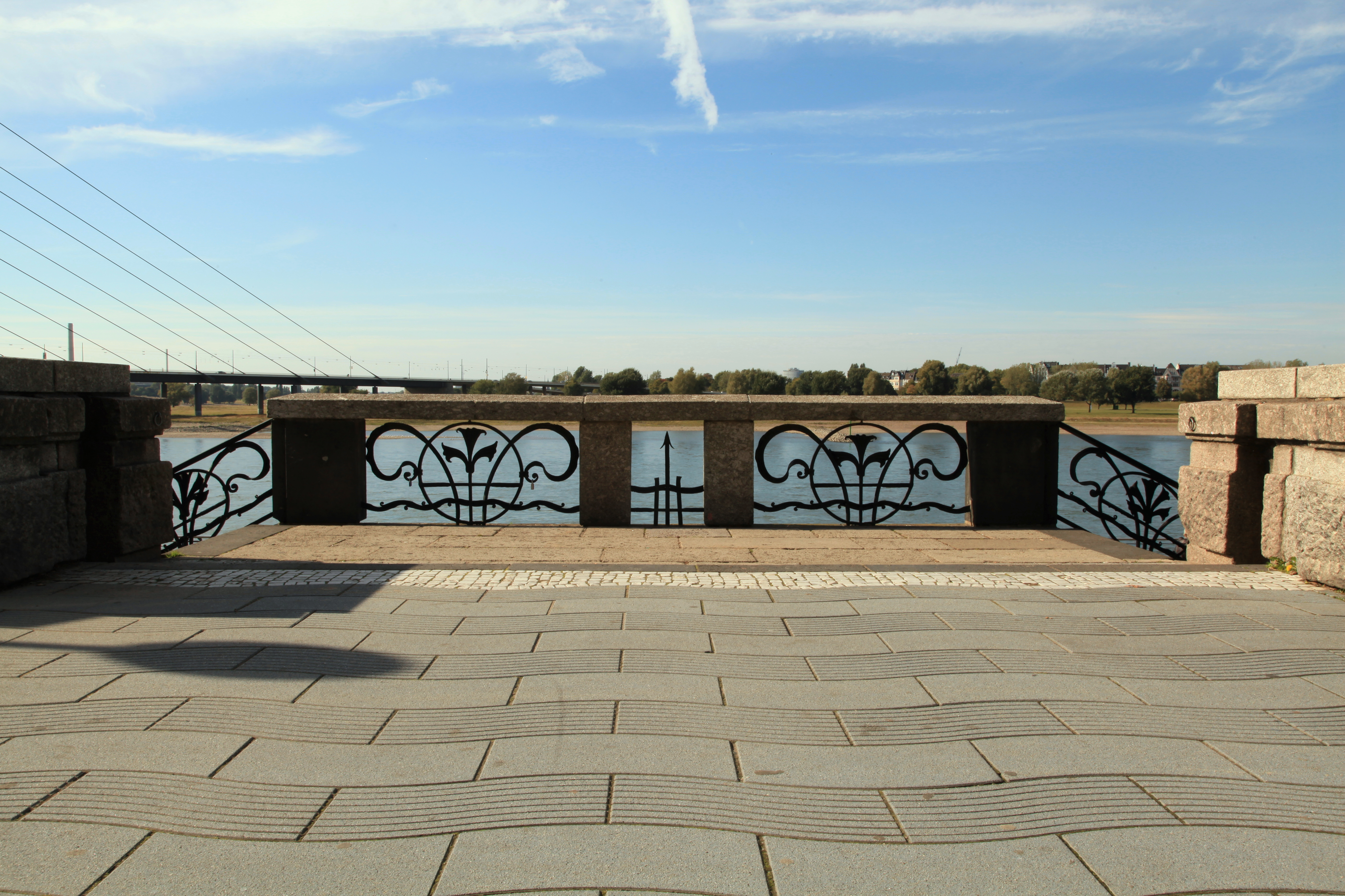 Rathausufer in Düsseldorf